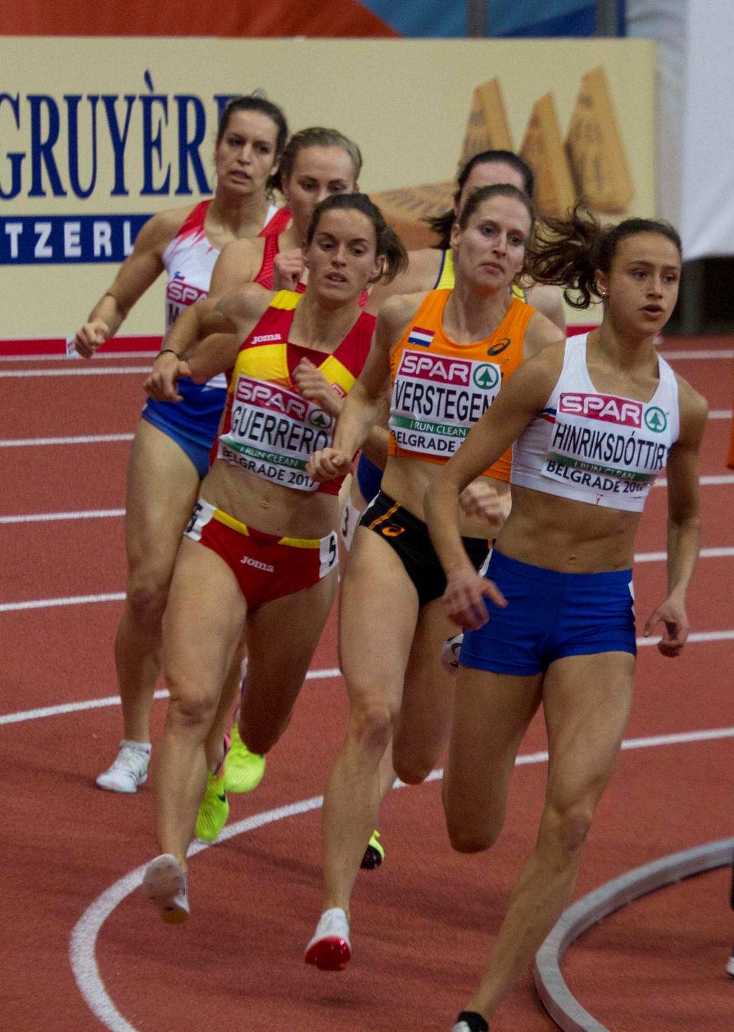 135 800m halve finale henriksdottir